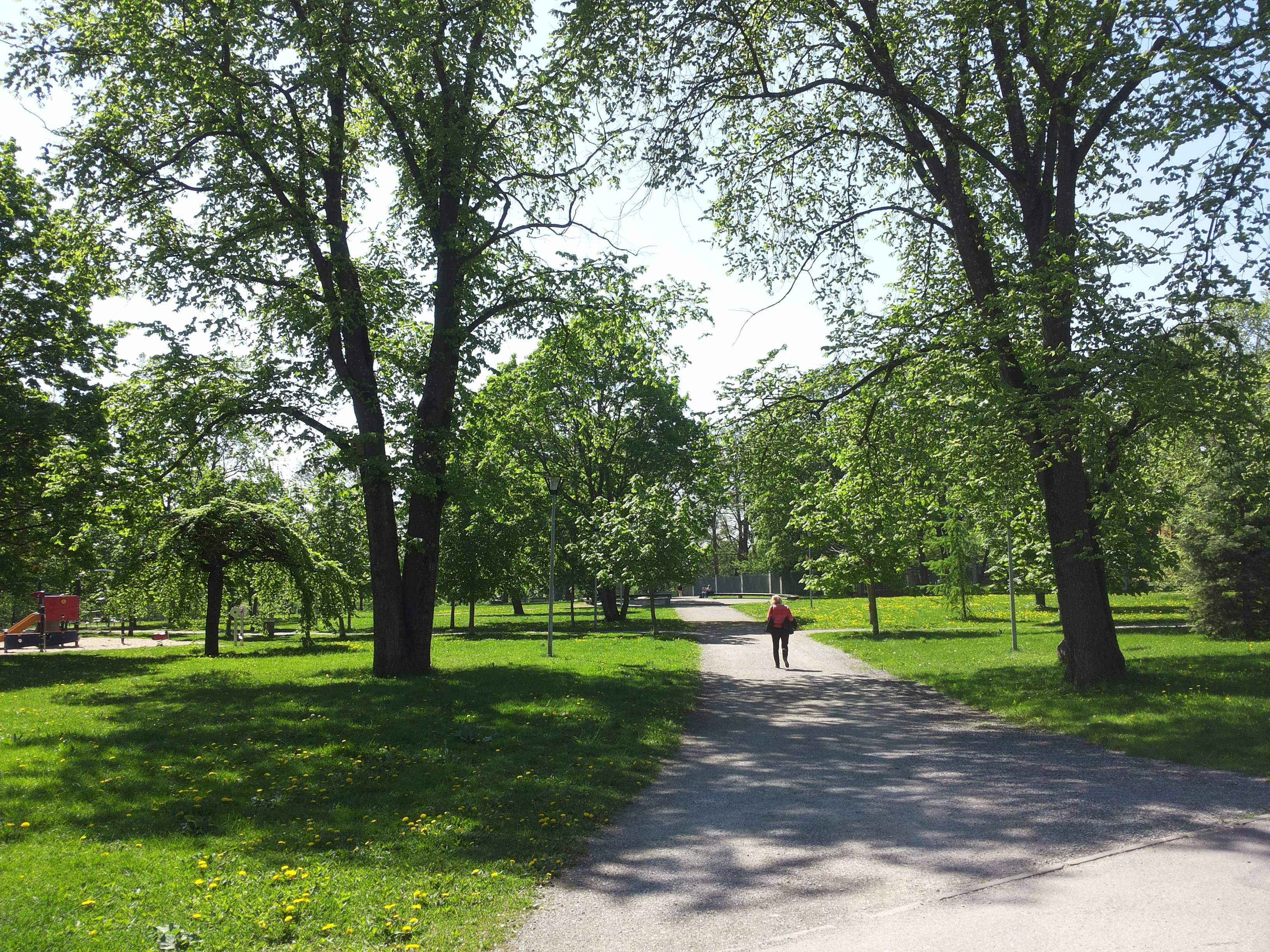 Tuvi park